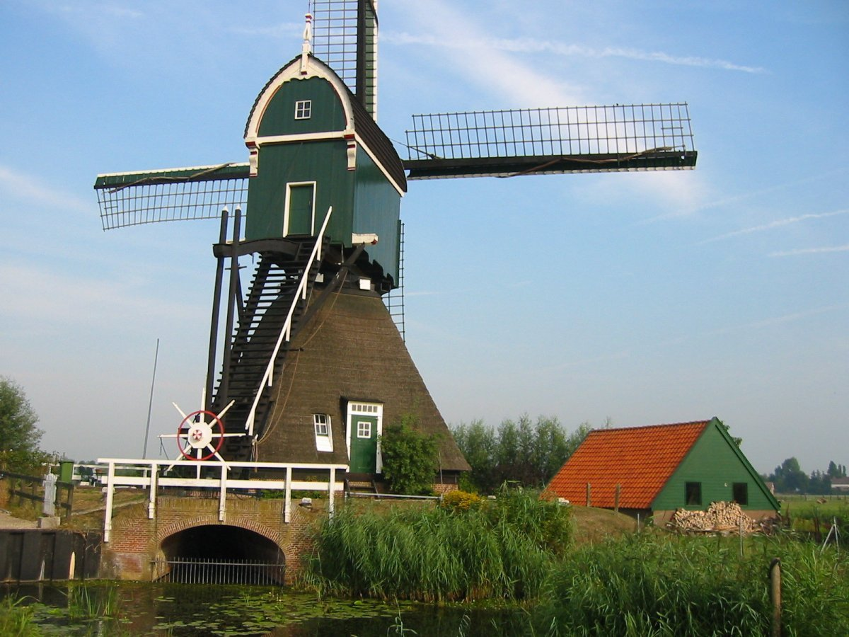 Boterslootse molen/ Ten-Bruggencatenummer: 00832: Wipmolen van achteren gefotografeerd (opmerking: Foto gemaakt in het kader van het project Actualisering Monumentenregister (AMR).)